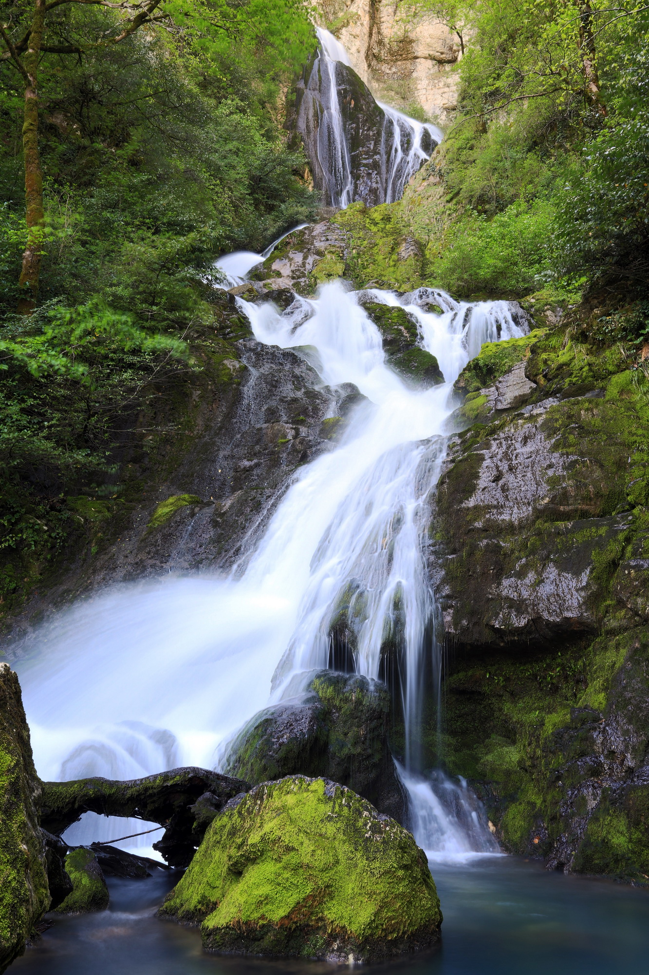 ტობის ჩანჩქერისა და არსენ ოქროჯანაშვილის მღვიმის ბუნების ძეგლები ღირშესანიშნაობა: ბუნების ძეგლების კომპლექსი წარმოადგენს არსენ ოქროჯანაშვილის (ტობა II) მღვიმისა და მისგან გადმომავალი ტობას კასკადოვანი ჩანჩქერის ერთობლიობას, რომელიც იშვიათ და ულამაზეს სანახაობას ქმნის. მღვიმე ძნელად მისადგომია და სპეციალური აღჭურვილობის გარეშე იქ ასვლა არ არის რეკომენდებული, ხოლო შიგნით სამოგზაუროდ საჭიოა რეზინის ნავი. გამომუშავებულია ზედაცარცულ შრეებრივ კირქვებში. შესასველეი (15X20 მ ) ქარაფის გასწვრივ იხსნება. სამიარუსიანი, მრავალგანშტოებიან მღვიმეში რამდენიმე დარბაზია. მათ შორის გამოირჩევა: „ნონას დარბაზი“, „ნანას დარბაზი“, „სალონი“, „უნივერსიტეტი 50“, „ტბიანი“ და სხვა დარბაზები. ქიმიური ნალექები მრავალფეროვანი ფორმებით არის წარმოდგენილი. ერთ-ერთი სტალაგმიტის სიმარლე 7 მ აღწევს. მღვიმის ჯამური სიგრძით 1300 მ-ია. მღვიმიდან გამომავალი მდინარე, რომელიც მიწისქვეშ 4 ტბას აჩენს, წარმოქნის 234 მ სიმაღლის, (საქართველოში ყველაზე მაღალი) ტობის კასკადური ჩანჩქერს. მდებარეობა: მარტვილის მუნიციპალიტეტი, სოფ. მეორე ბალდის ჩრდილო-აღმოსავლეთით, მდ. აბაშის მარჯვენა შენაკადის ტობას ხეობა, 707 მეტრი ზღვის დონიდან. კოორდინატები: N42 28.325 E42 27.315